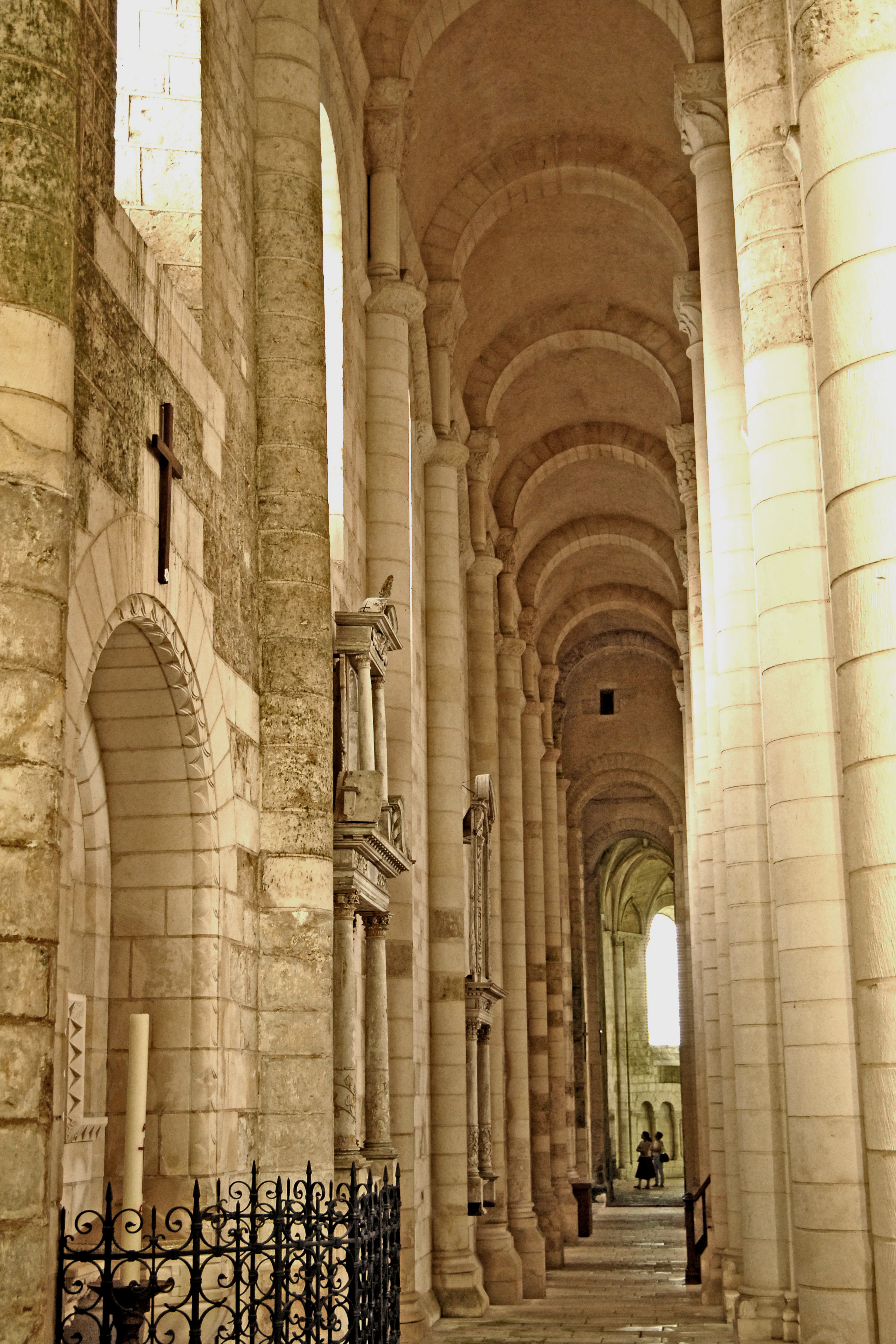 Saint-Jouin-de-Marnes, nördliches Seitenschiff